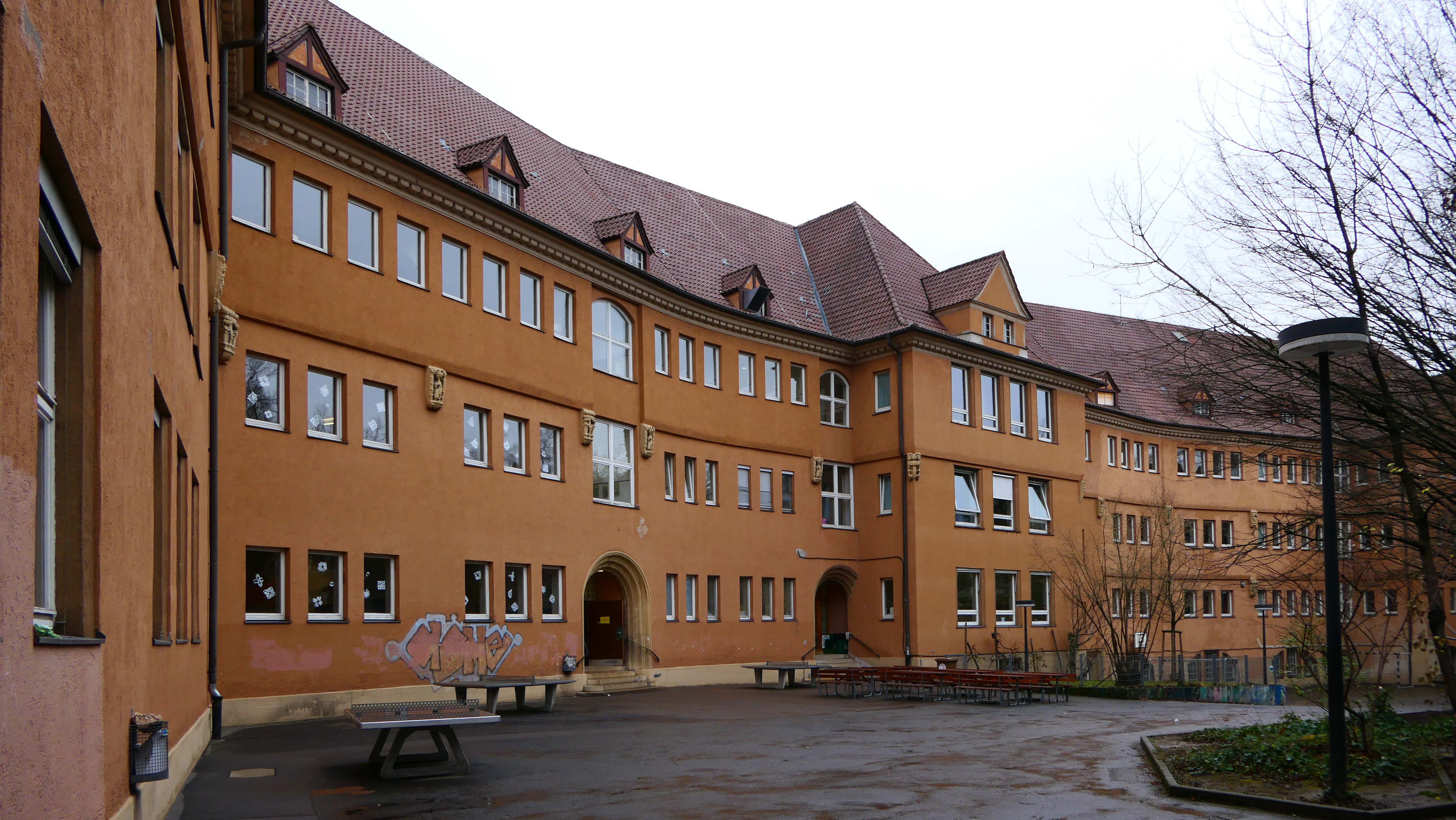 Wagenburg-Gymnasium, Stuttgart, Rückseite im Westen